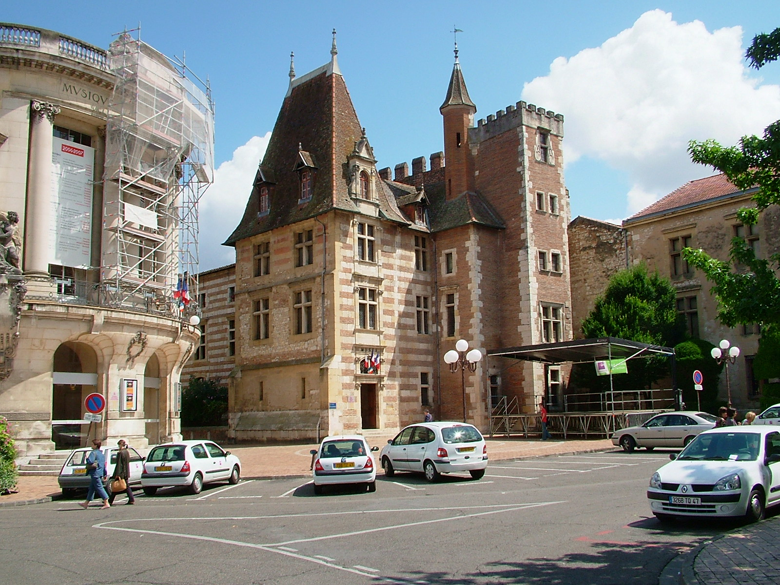 France, Lot-et-Garonne, Agen, musée des Beaux-Arts et Théâtre